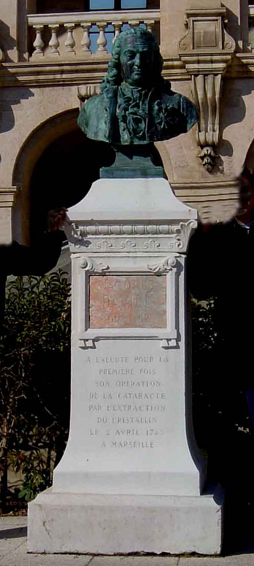 Bust of Jacques Daviel.